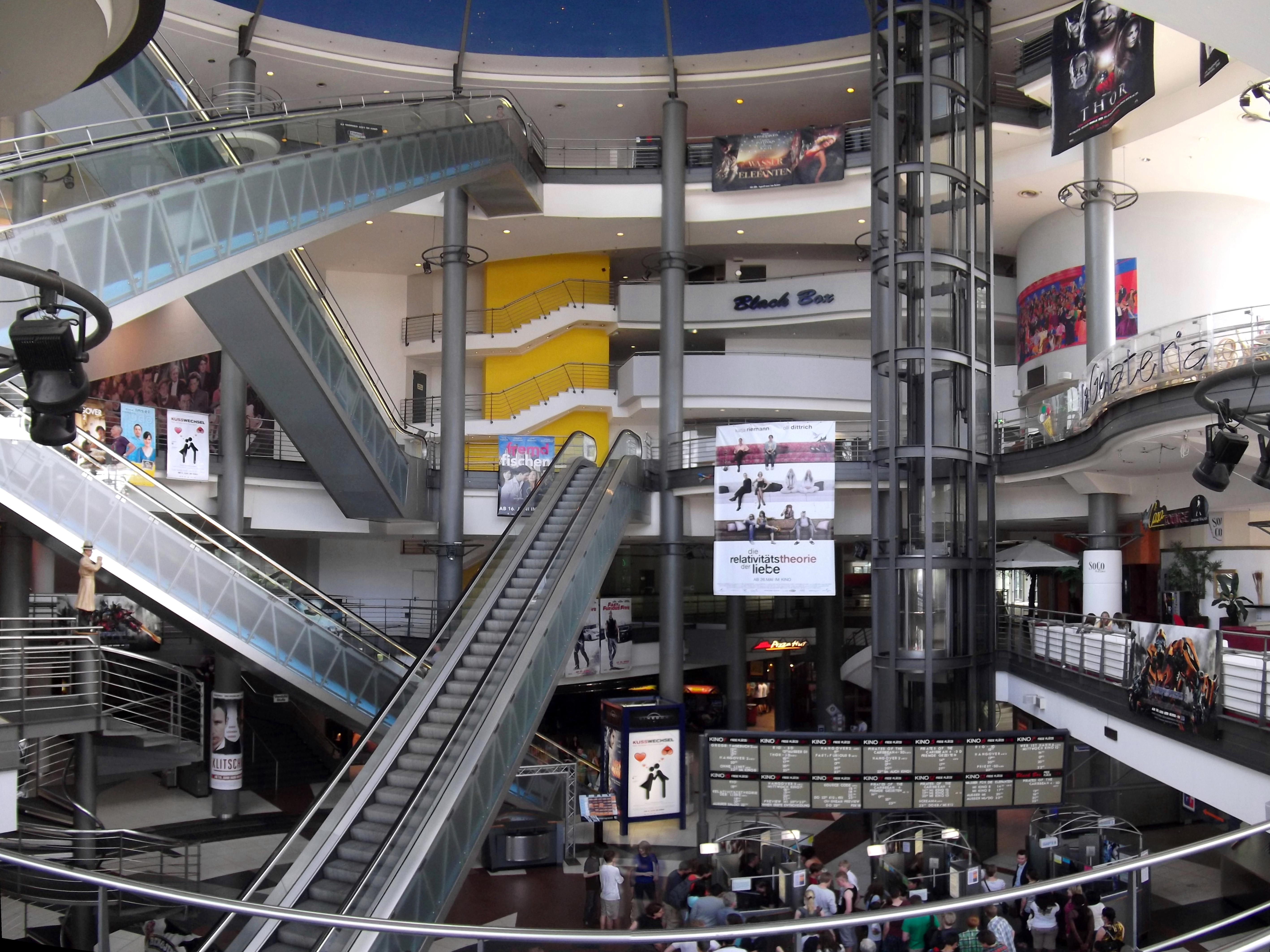 Cologne (Köln); Germany: Köln-Neustadt-Nord: MediaPark: Cinedom Multiplex-Kino